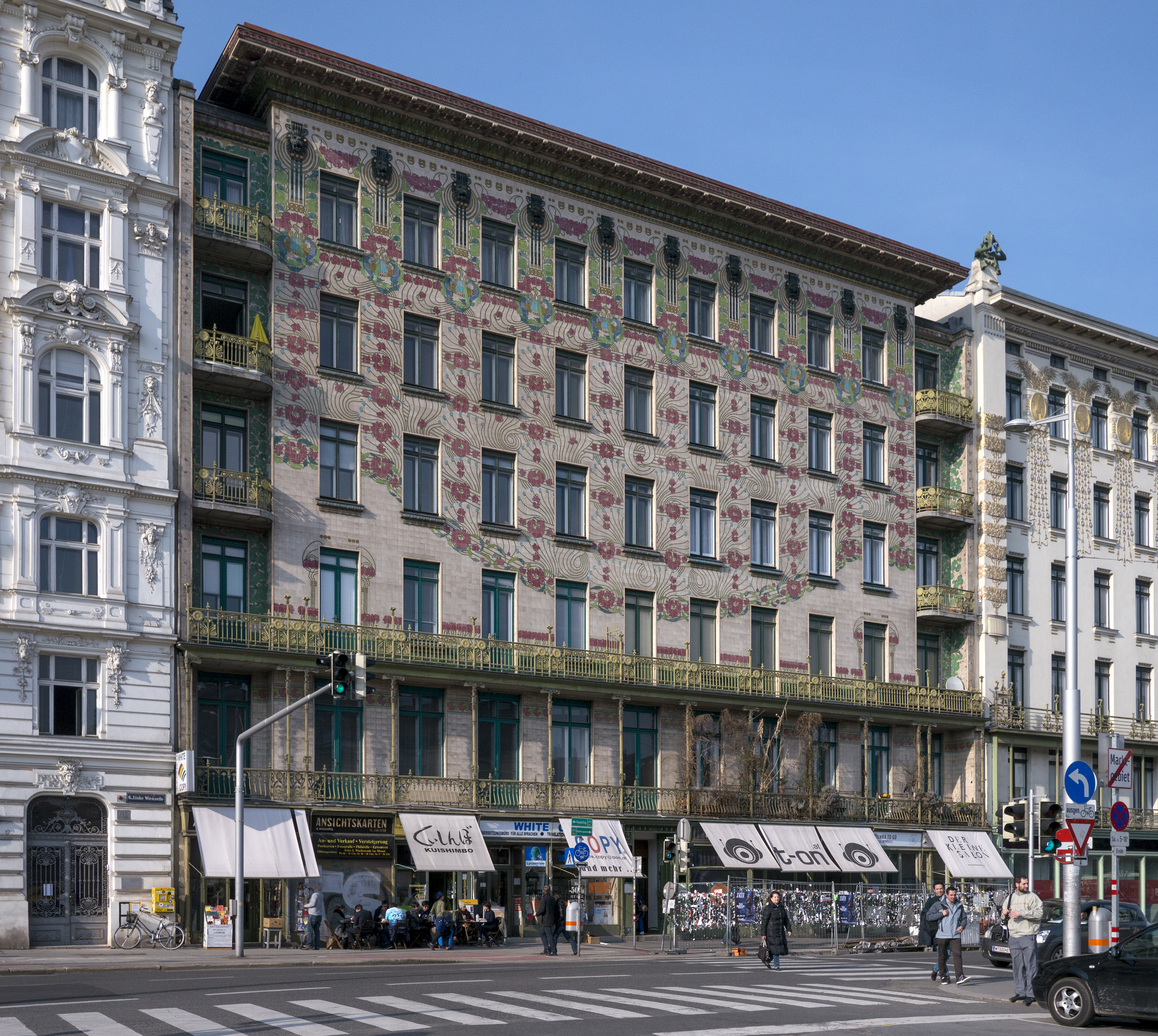 Majolikahaus